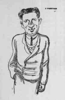 Шарж на Анатолия Дмитриевича Камегулова (1890-1937) — русского советского литературоведа, литературного критика.